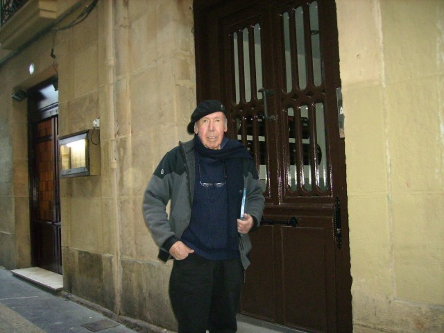 Mikel Laboa abeslaria 2008ko apirilean